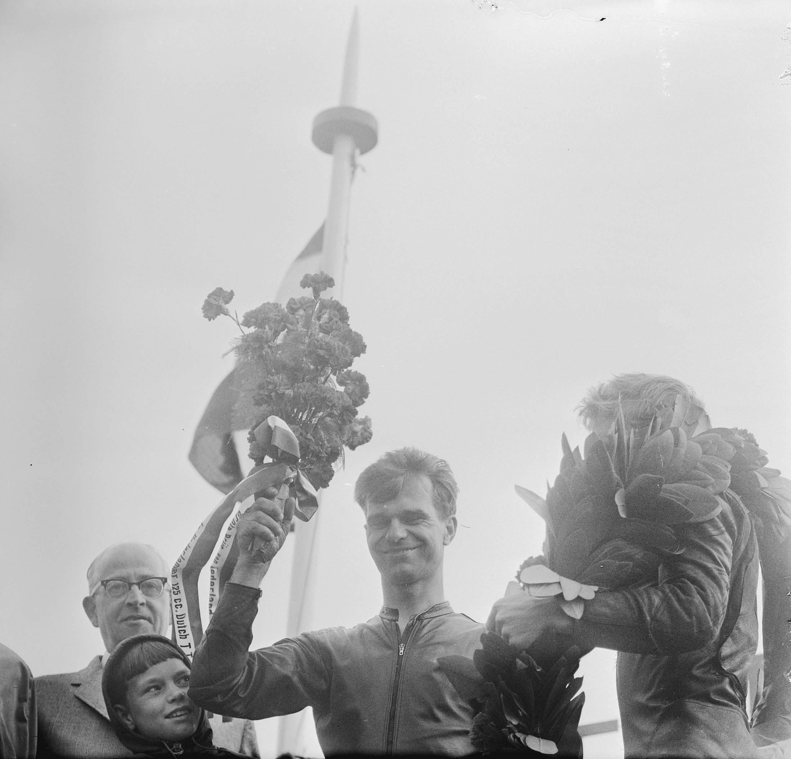 Collectie / Archief : Fotocollectie Anefo Reportage / Serie : TT Assen 1966 Beschrijving : Huldiging 125cc. Cees van Dongen, beste Nederlander (8e) met bloemen. Rechts winnaar Bill Ivy met krans Datum : 25 juni 1966 Locatie : Assen Fotograaf : Voets, Jan / Anefo Auteursrechthebbende : Nationaal Archief Materiaalsoort : Negatief (zwart/wit) Nummer archiefinventaris : bekijk toegang 2.24.01.03 Bestanddeelnummer : 919-2880